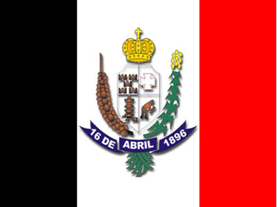 Detalhe digitalizado da bandeira do Município de Codó (MA), no nordeste do Brasil.